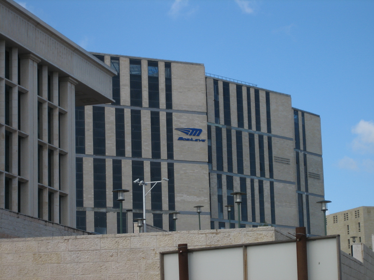 Mobileye